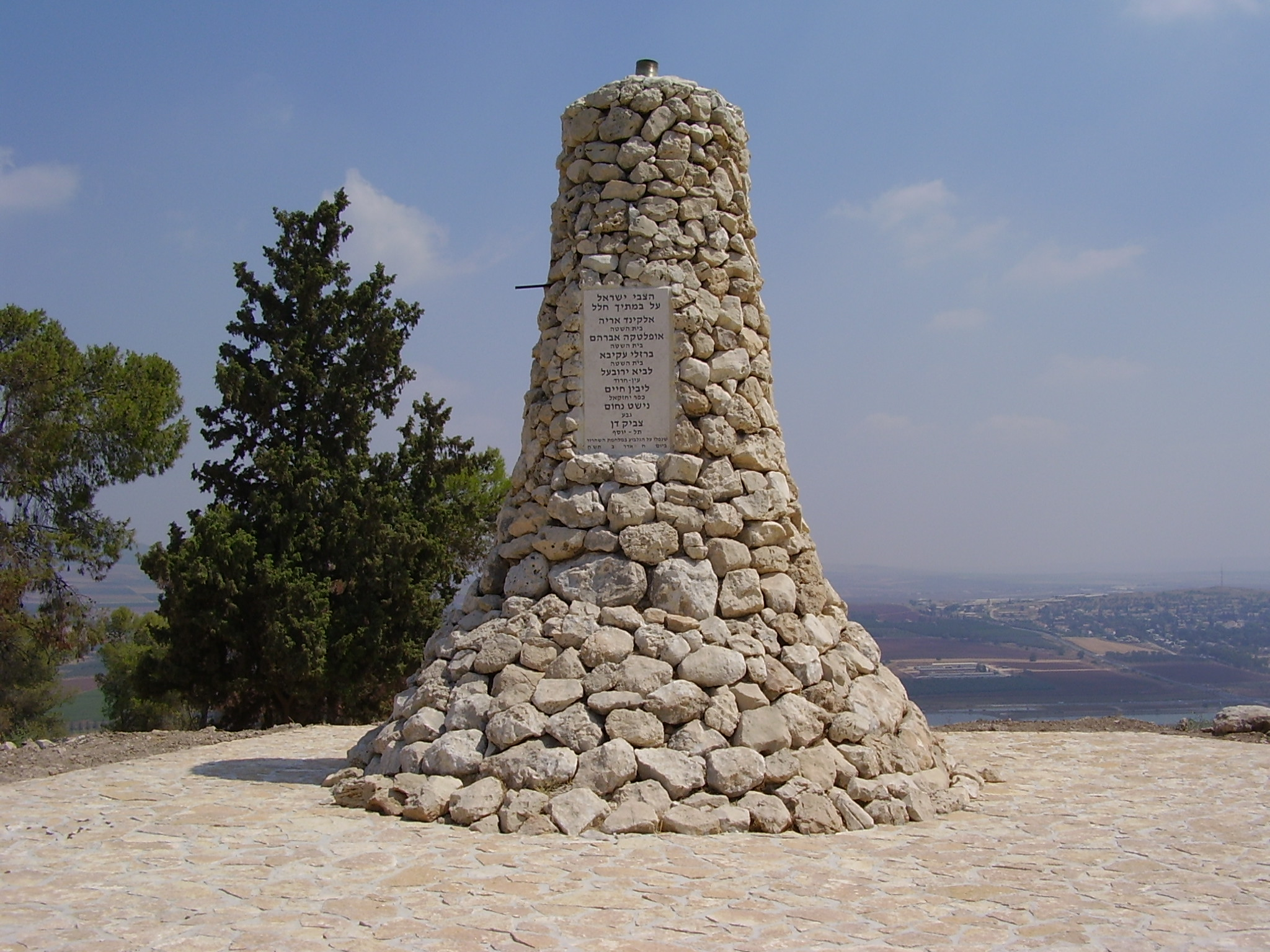 אנדרטת השבעה בגבעת יהונתן בהרי הגלבוע רישיון נוצר על ידי משתמש:Avi1111